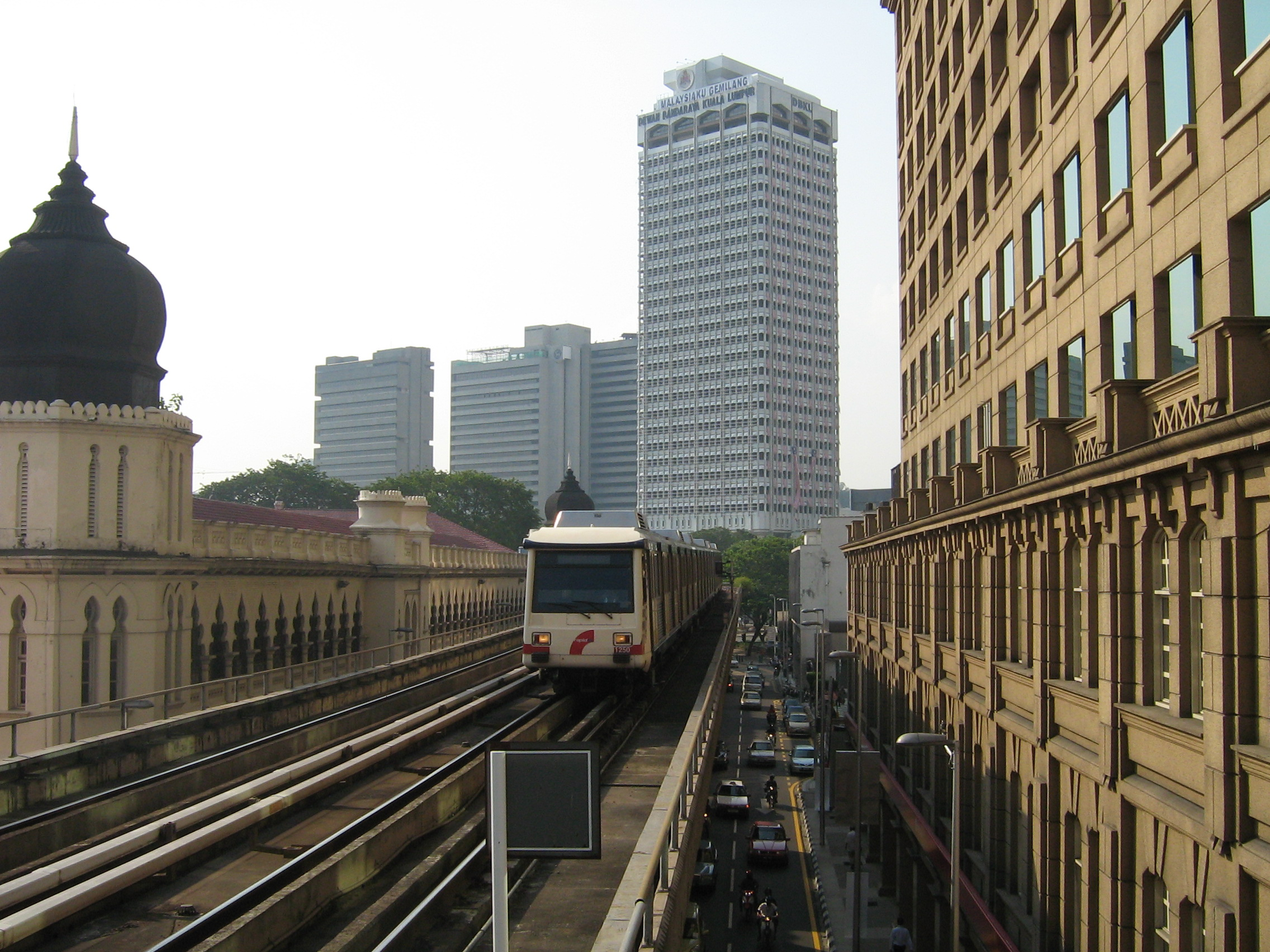 star LRT at masjid jamek station in kuala lumpur